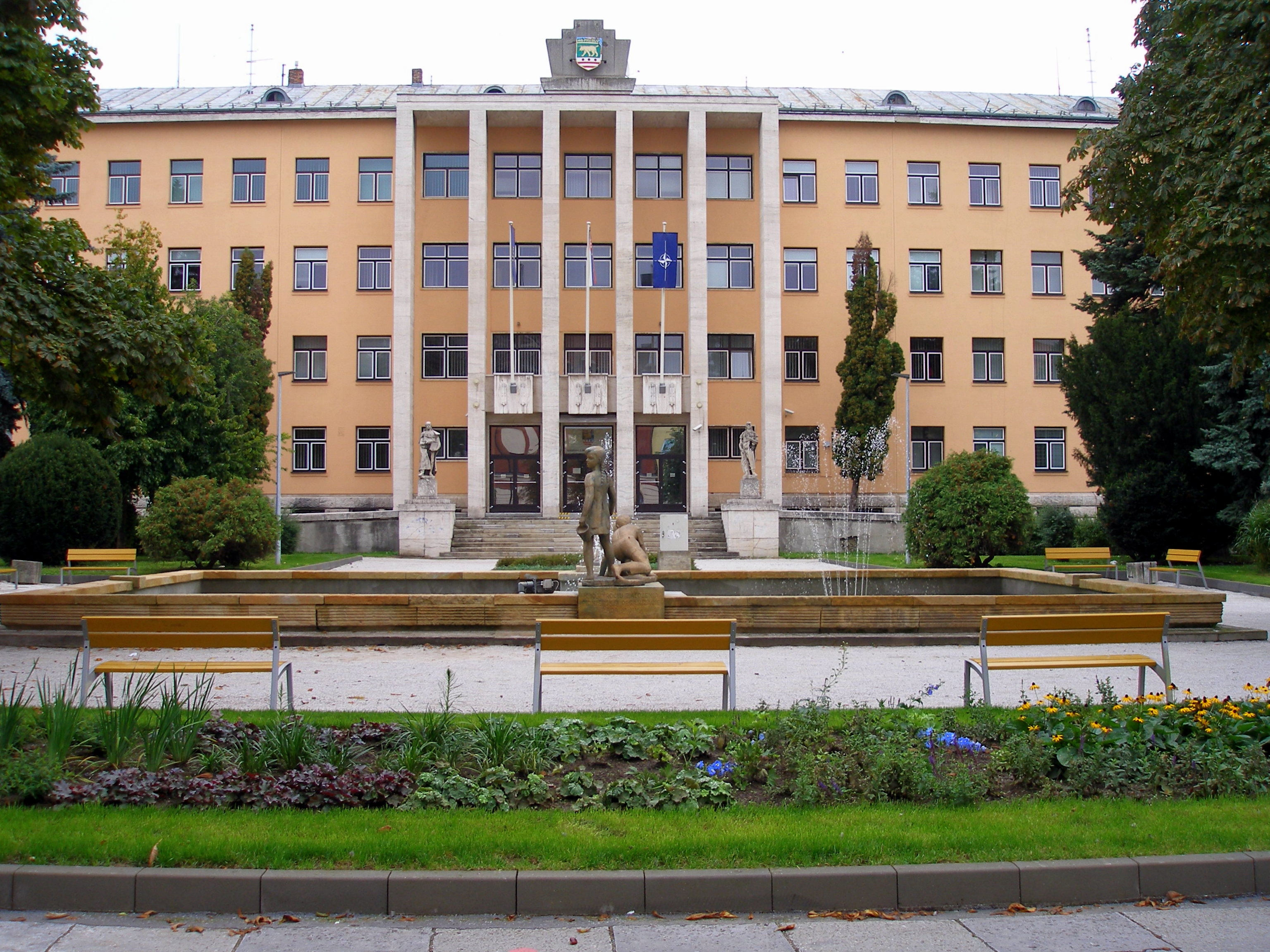 Fontána pred budovou vojenského veliteľstva v Prešove.